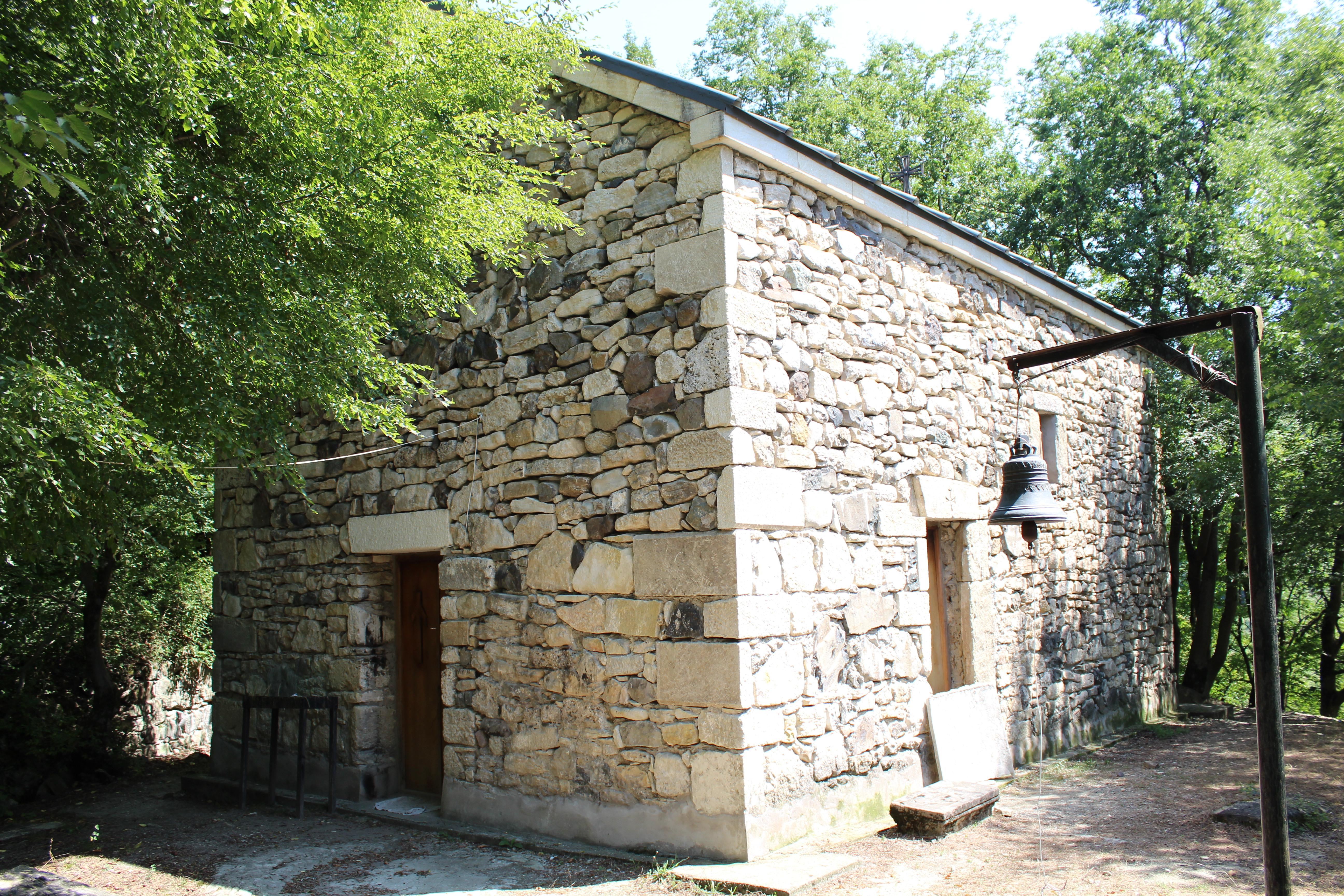 ვანის ღვთისმშობლის ეკლესია